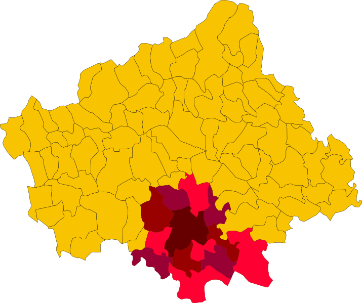 Mappa comuni dell'area metropolitana di Treviso